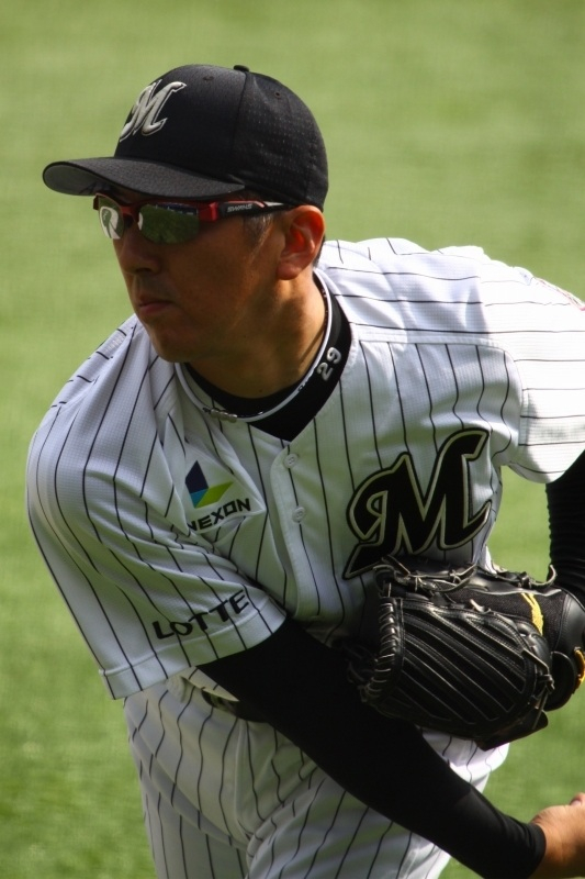 日本プロ野球 千葉ロッテマリーンズの小野晋吾投手 背番号29